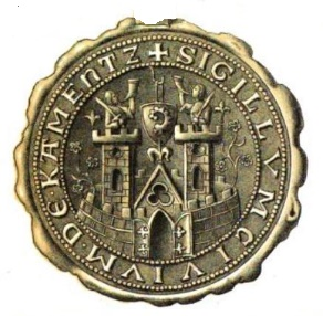 Kamenz-Siegel